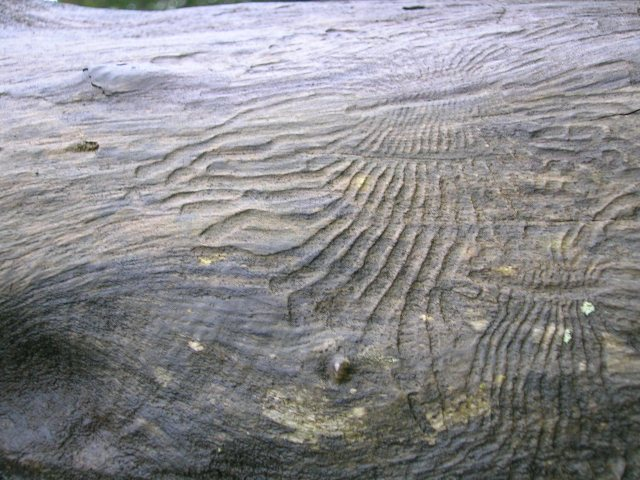 Scolytinae beetle damage under bark from Nagerhole, India